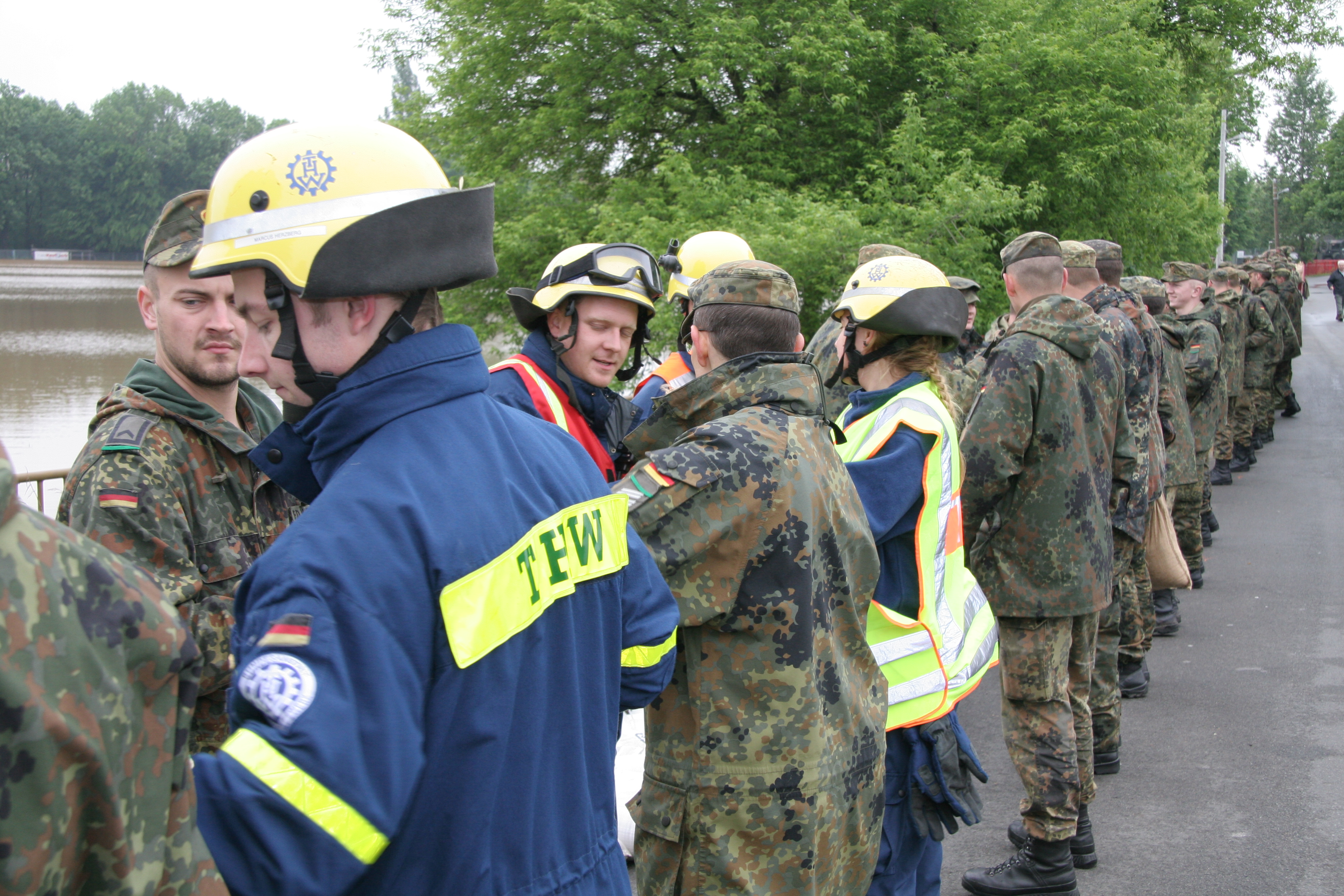 Zivil-militärische Zusammenarbeit (ZMZ) in Dresden beim Hochwasser im Juni 2013